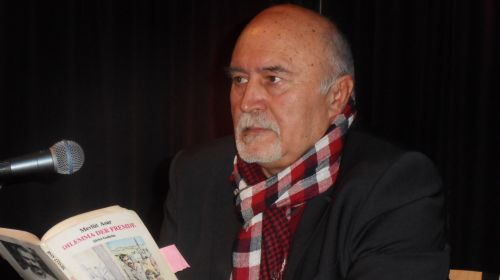 bei einer Autorenlesung in Gelsenkirchen